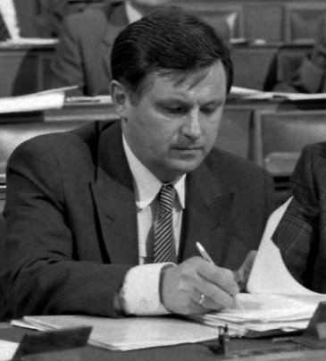 Németh Miklós közgazdász, politikus, a rendszerváltás előtti utolsó magyar kormány miniszterelnöke, és az 1989. október 23-án kikiáltott Magyar Köztársaság első kormányfője.